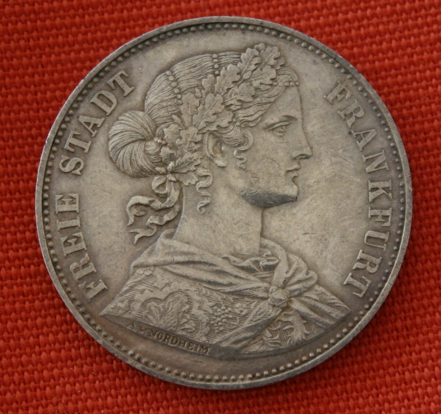 Vereinstaler der Freien Stadt Frankfurt von 1865